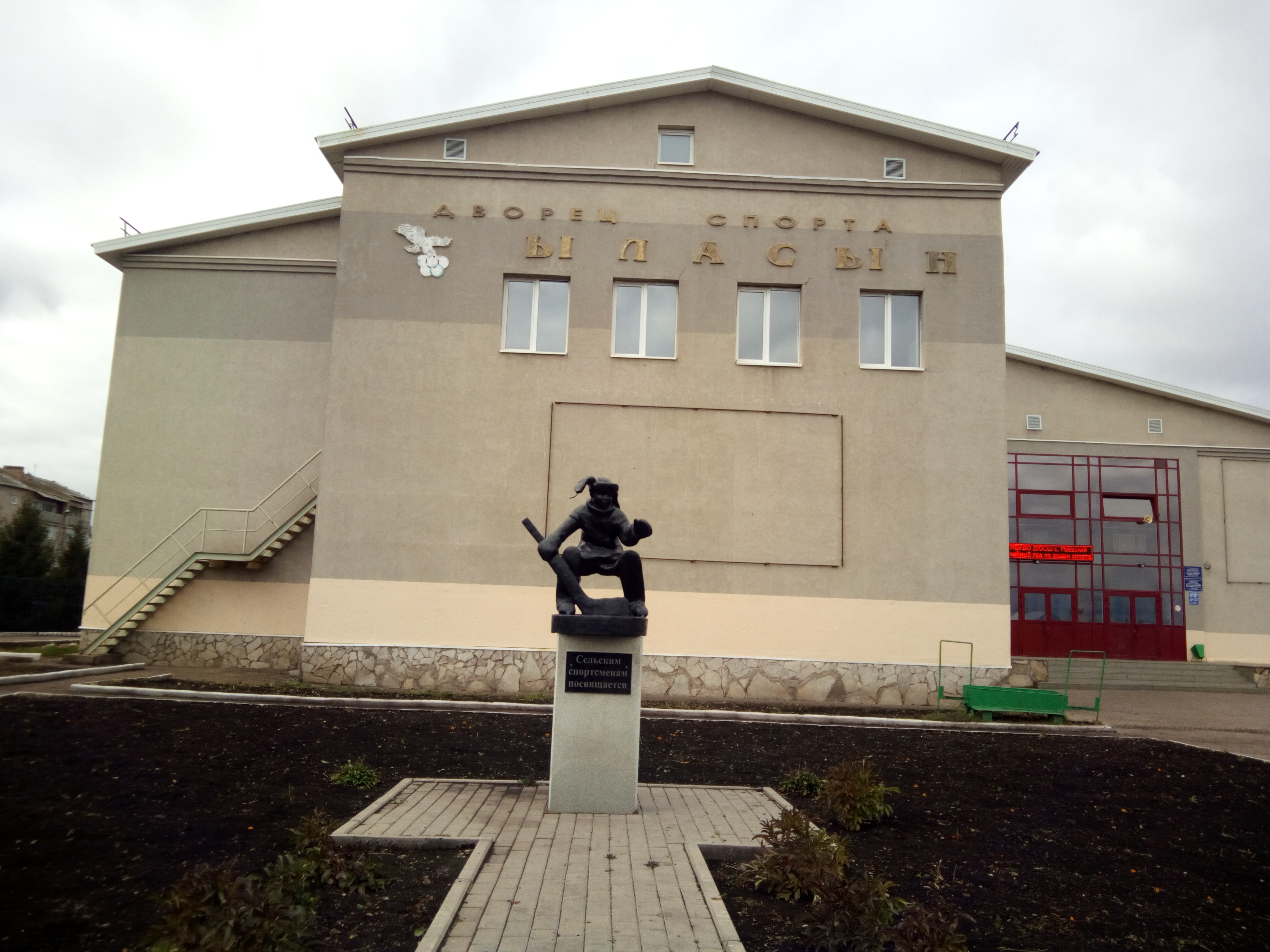 Ра́евский — село 16 ноября 1938 года до 2005 г. посёлок городского типа) в Республике Башкортостан России, административный центр Альшеевского района и Раевского сельсовета.